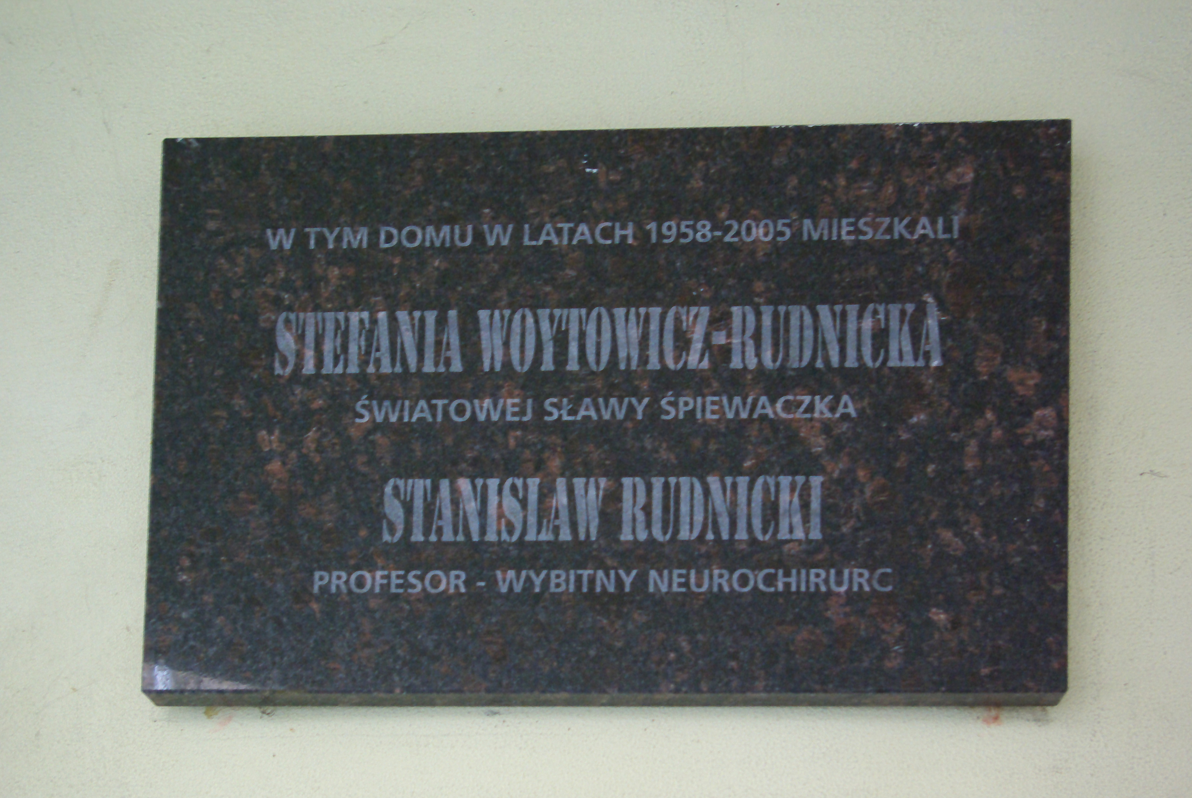 Aleja Przyjaciół 3 w Warszawie. Tablica upamiętniająca zamieszkujących pod tym adresem Stanisława Rudnickiego i Stefanię Woytowicz